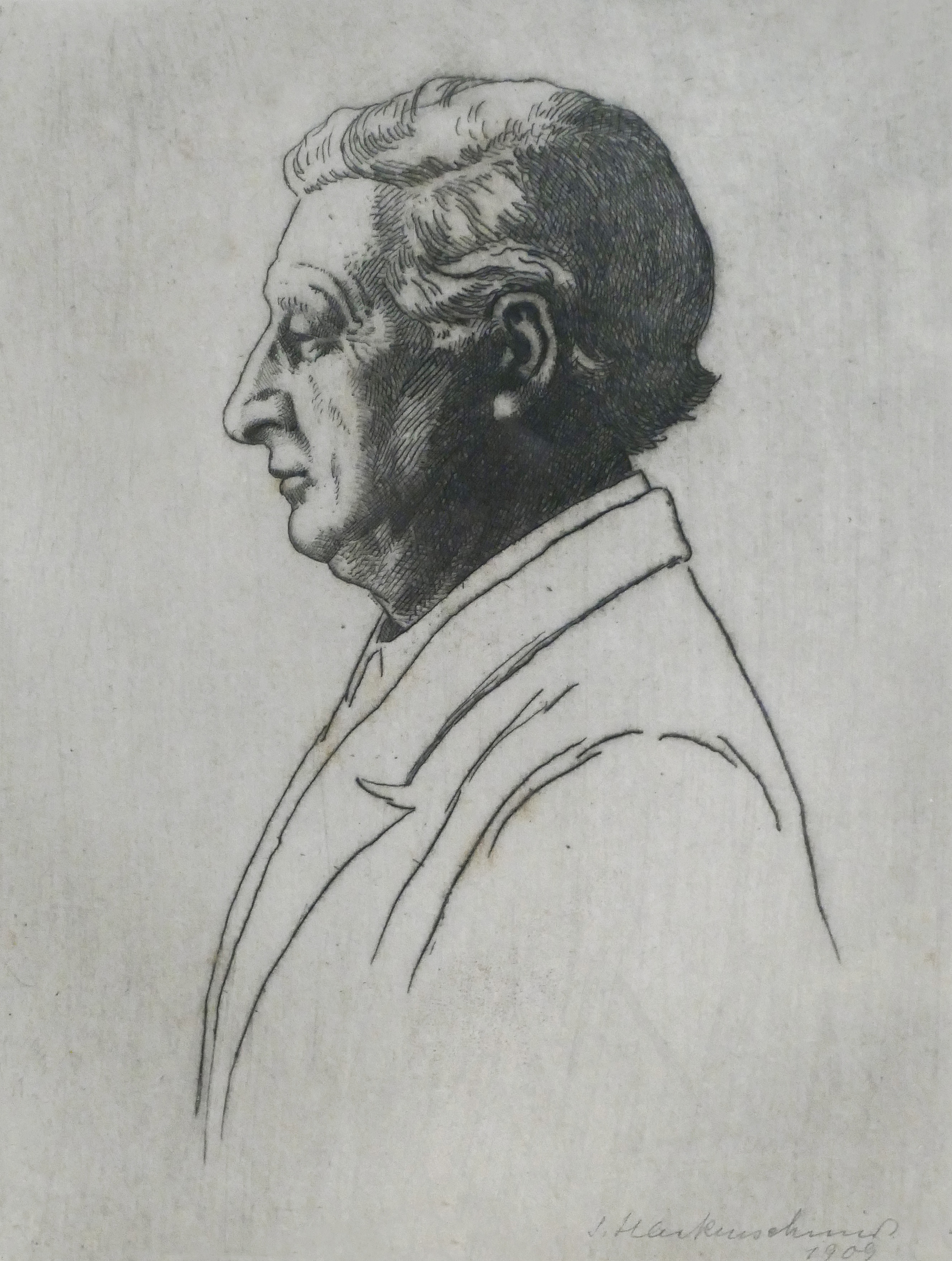 Portrait de Christian Karl Hackenschmidt, pasteur à l'église Saint-Pierre-le-Jeune de Strasbourg de 1885 à 1915, gravé par sa fille Sabine Hackenschmidt, offert à l'église où il est conservé à l'église.